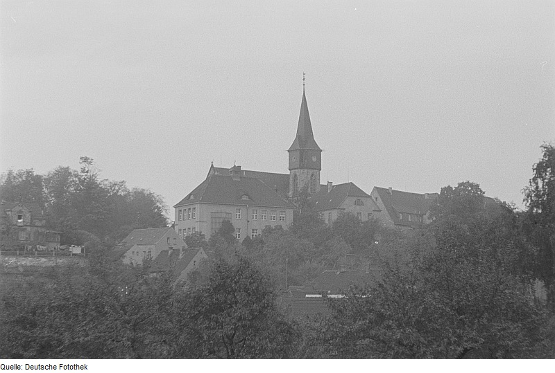 Original image description from the Deutsche Fotothek Kirche von Kohren-Sahlis